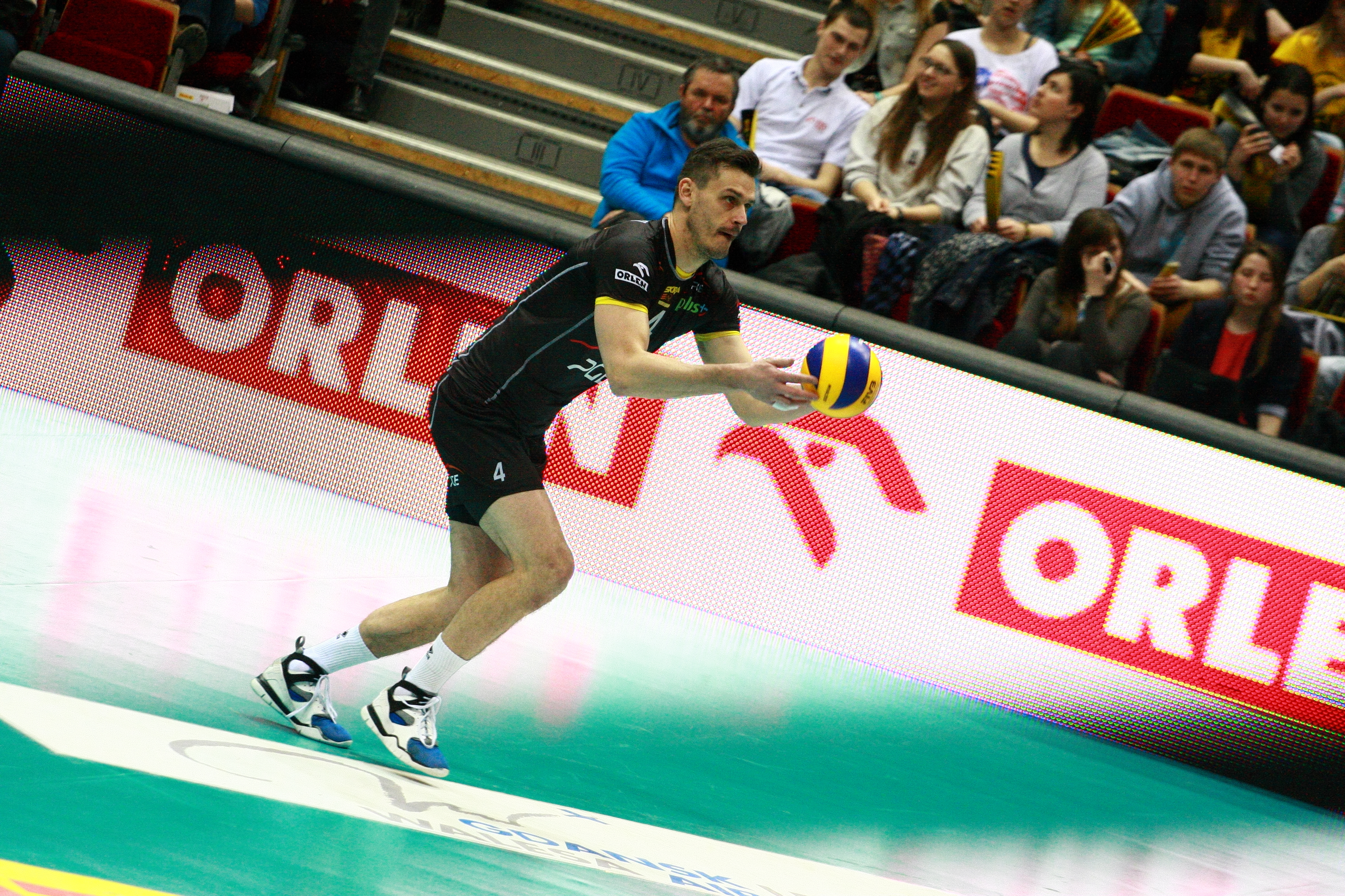 Lotos Trefl Gdańsk vs Skra Bełchatów